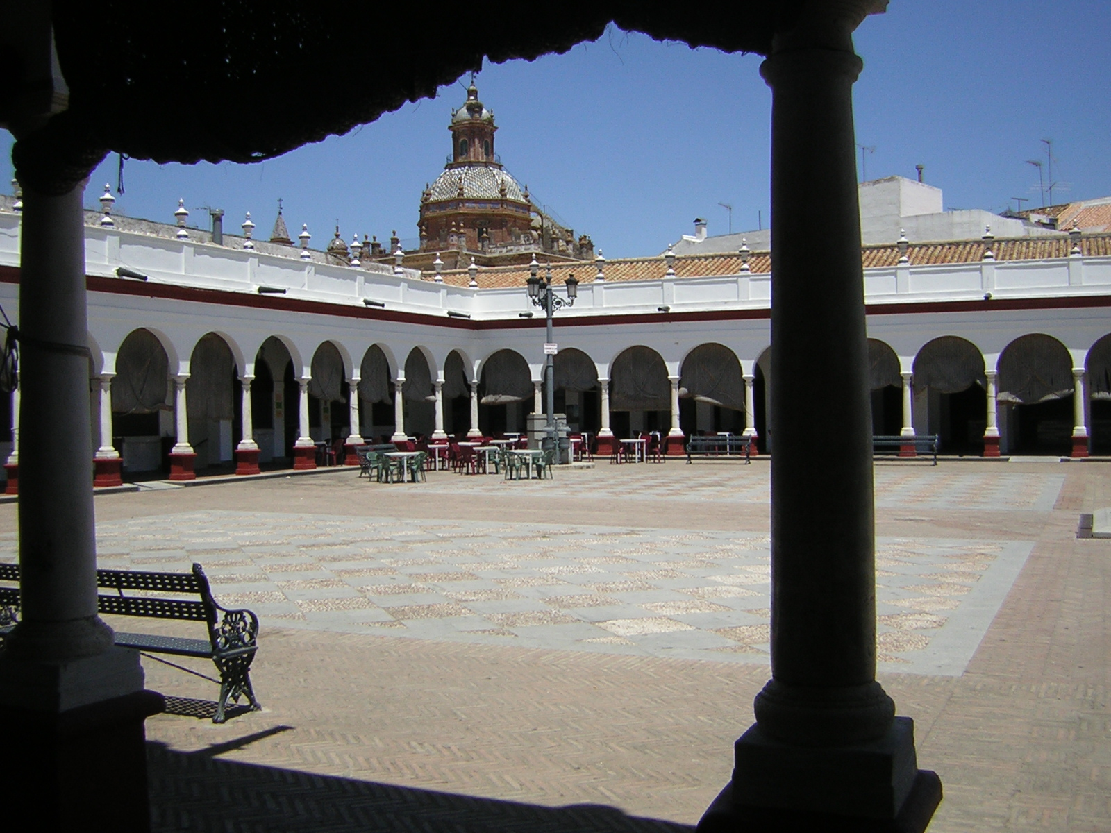 Plaza del Mercado